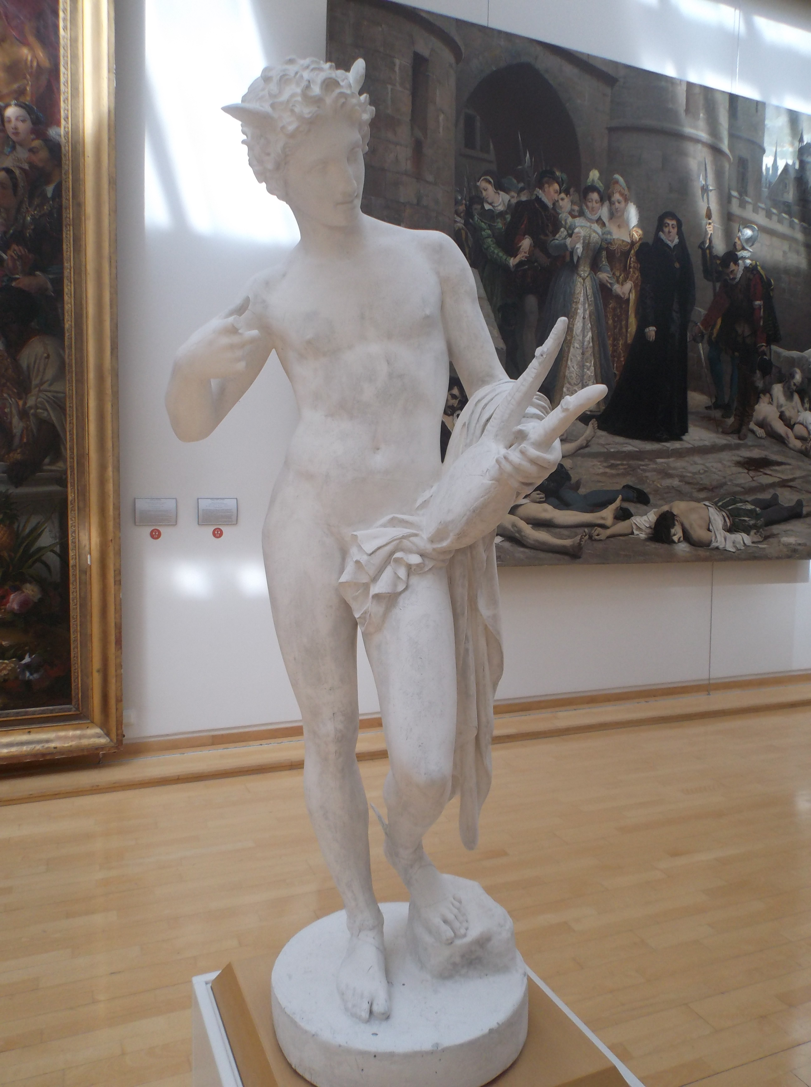 Mercure inventant la lyre. Statue par le sculpteur français Francisque Duret (1804-1865). 1831, plâtre. Inv.861.723.11. Dépôt de l'Etat en 1860. Musée d'art Roger-Quilliot, Clermont-Ferrand (France).